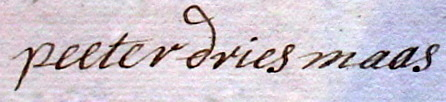 Handtekening van Peeter Andries Maas 1710 - 1784